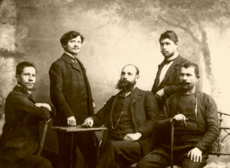 Left to right - Chudomir Kantardzhiev, Stoyo Hadzhiev, Yane Sandanski, Georgi Skrizhovski, (unknown)